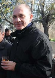 Miguel Mato, director de la película, y sus protagonistas, en la estancia El Puma. Entre otros, Darío Grandinetti.